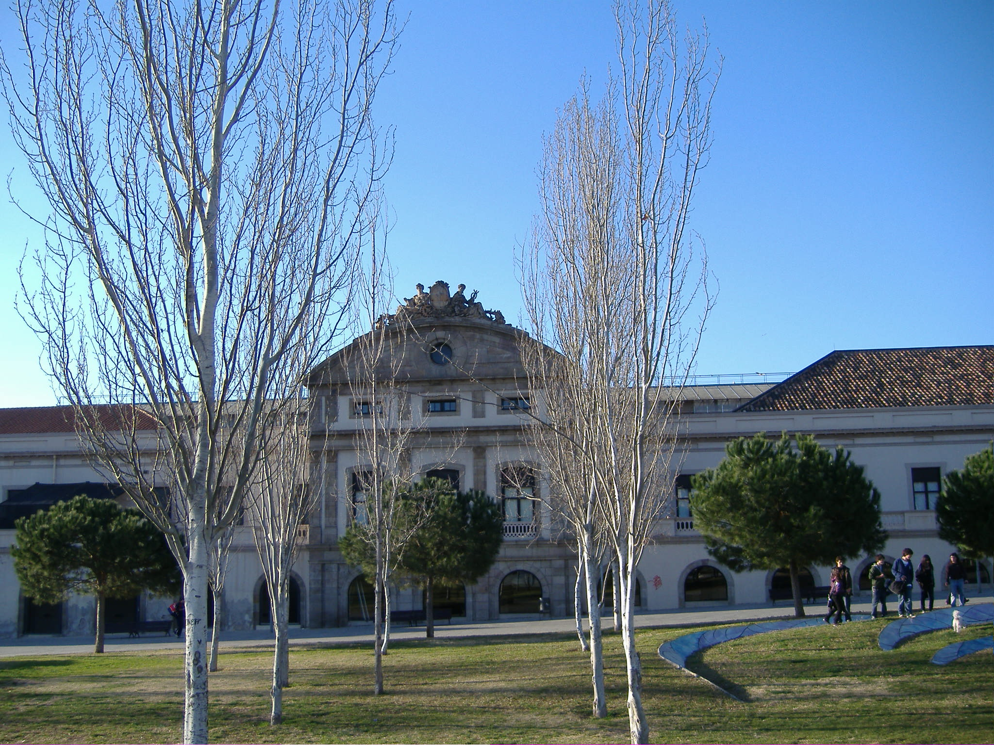 Façana mar de l'antiga estació de tren Barcelona Nord.